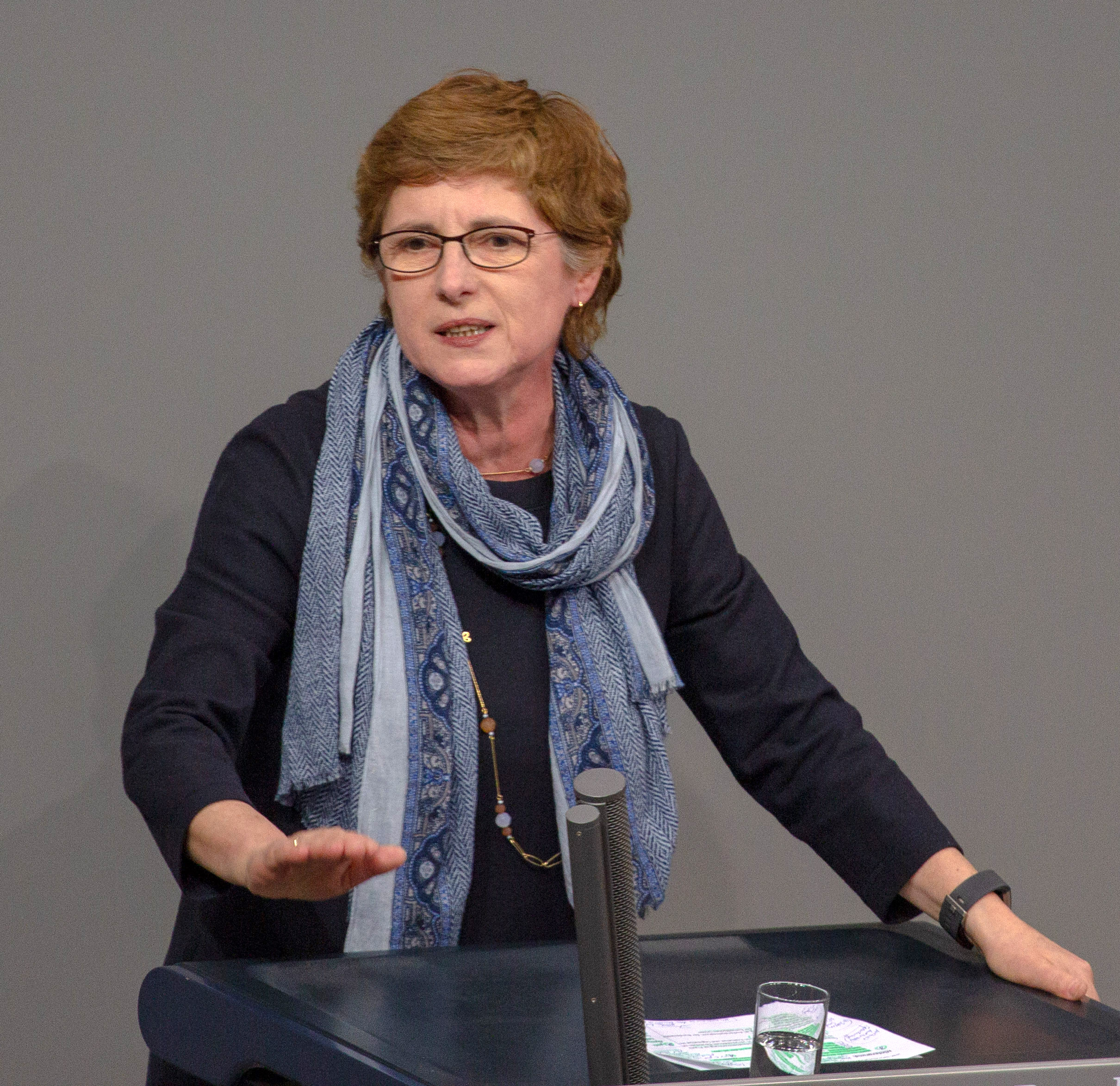 Britta Haßelmann, Mitglied des Deutschen Bundestages, während einer Plenarsitzung am 11. April 2019 in Berlin.